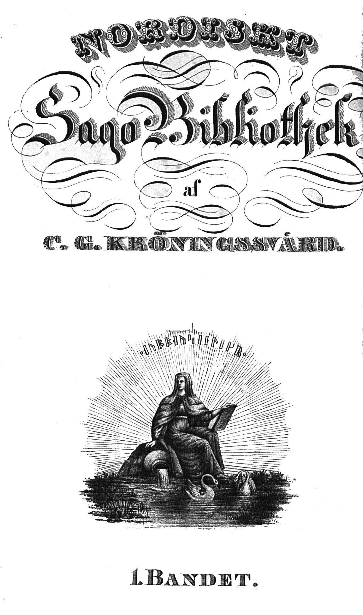 Title page: Nordiskt sago-bibliothek by Kröningssvärd, Carl Gustaf